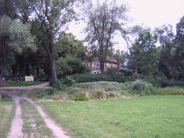 Haus Burglehn auf slawischem Burgwall, Lübben, Land Brandenburg, Deutschland Bild aufgenommen am 30.6.2006 von Olaf Meister